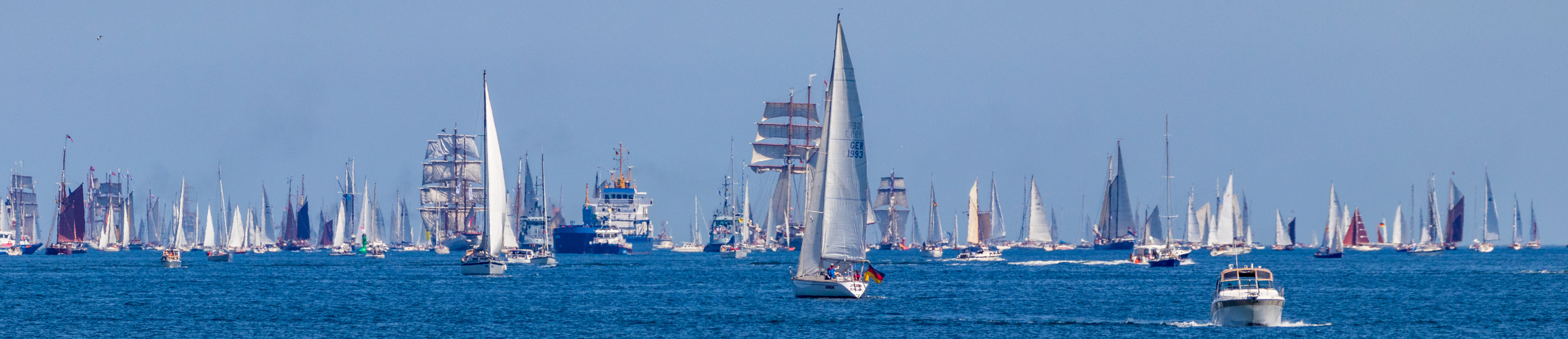 traditionelle Windjammerparade zur Kieler Woche